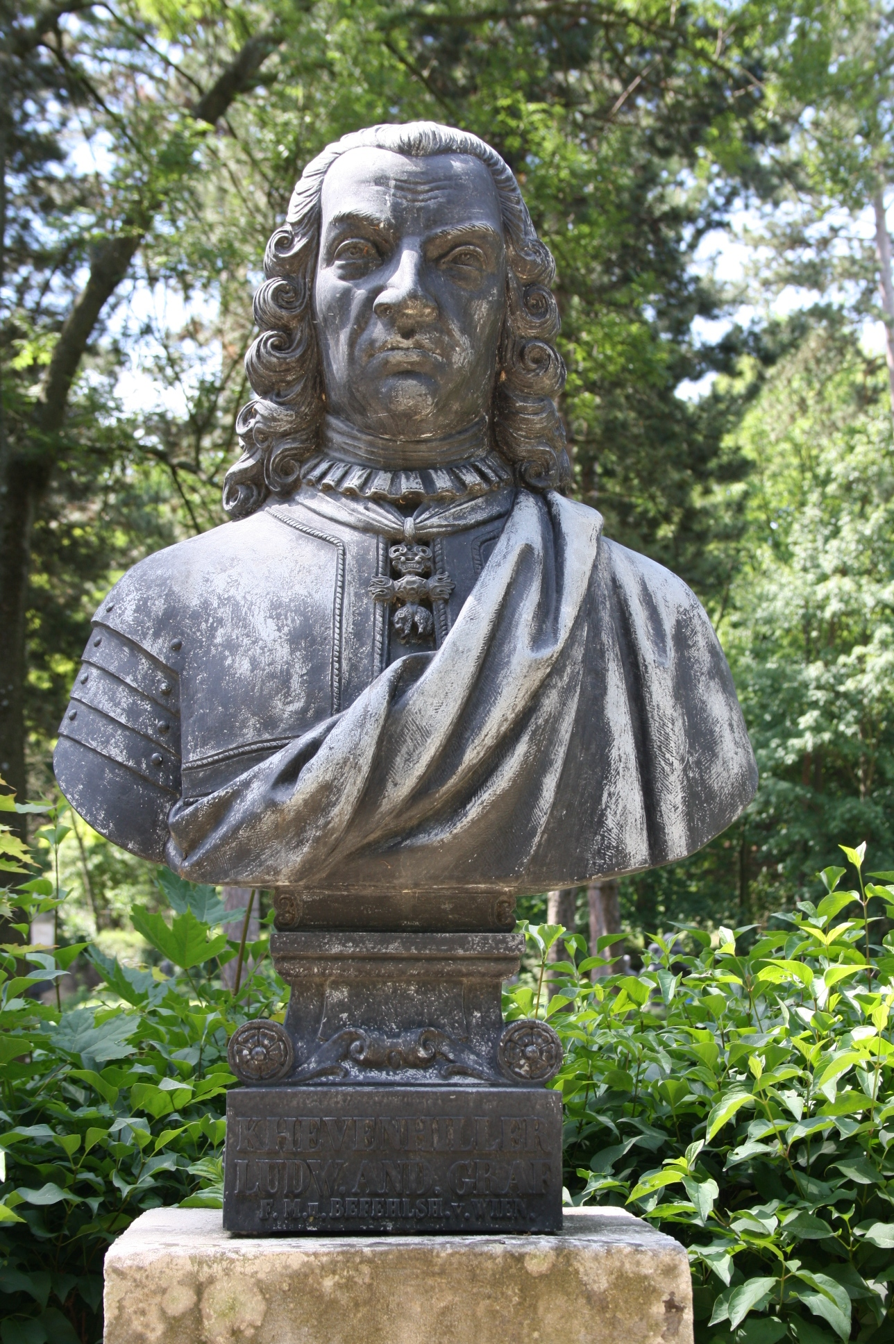 Büste in der Gedenkstätte Heldenberg (Niederösterreich)